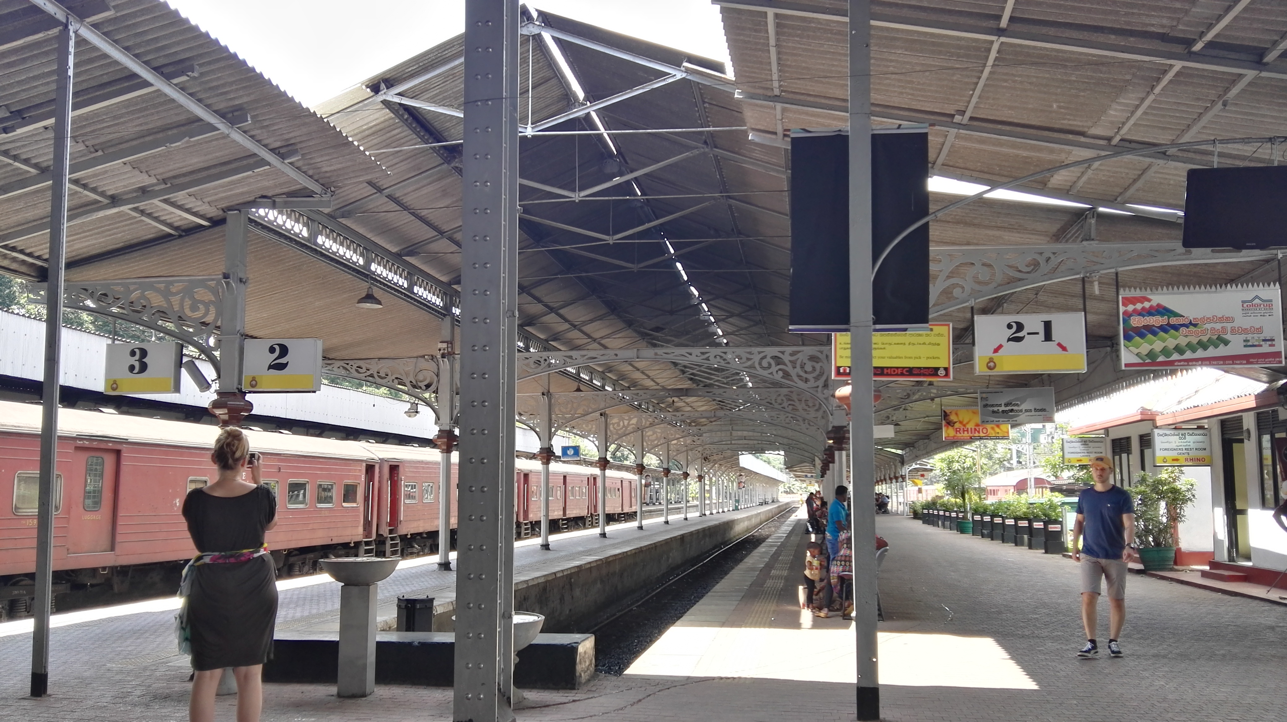 Bahnhof Kandy